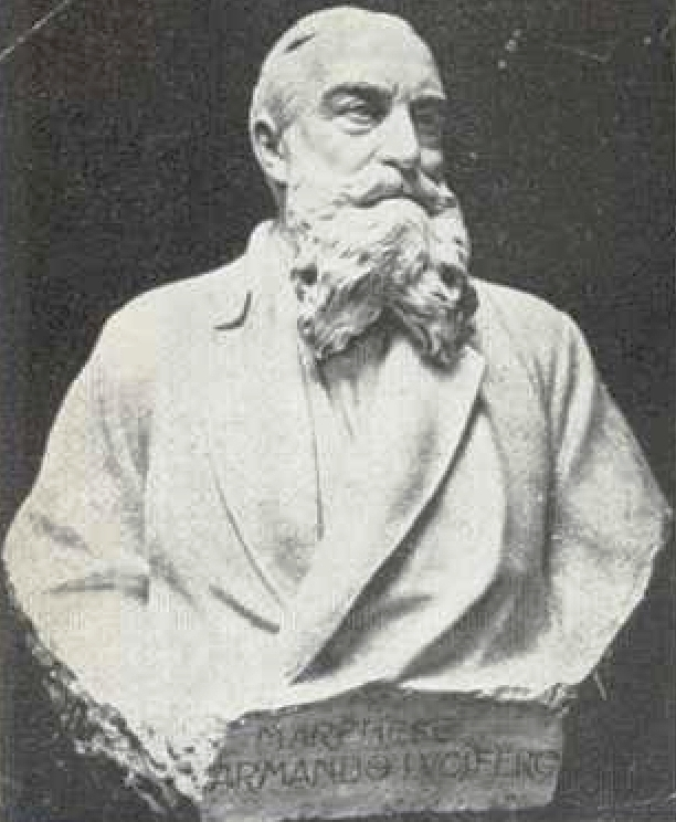 Busto di Armando Lucifero, realizzato da Francesco Jerace